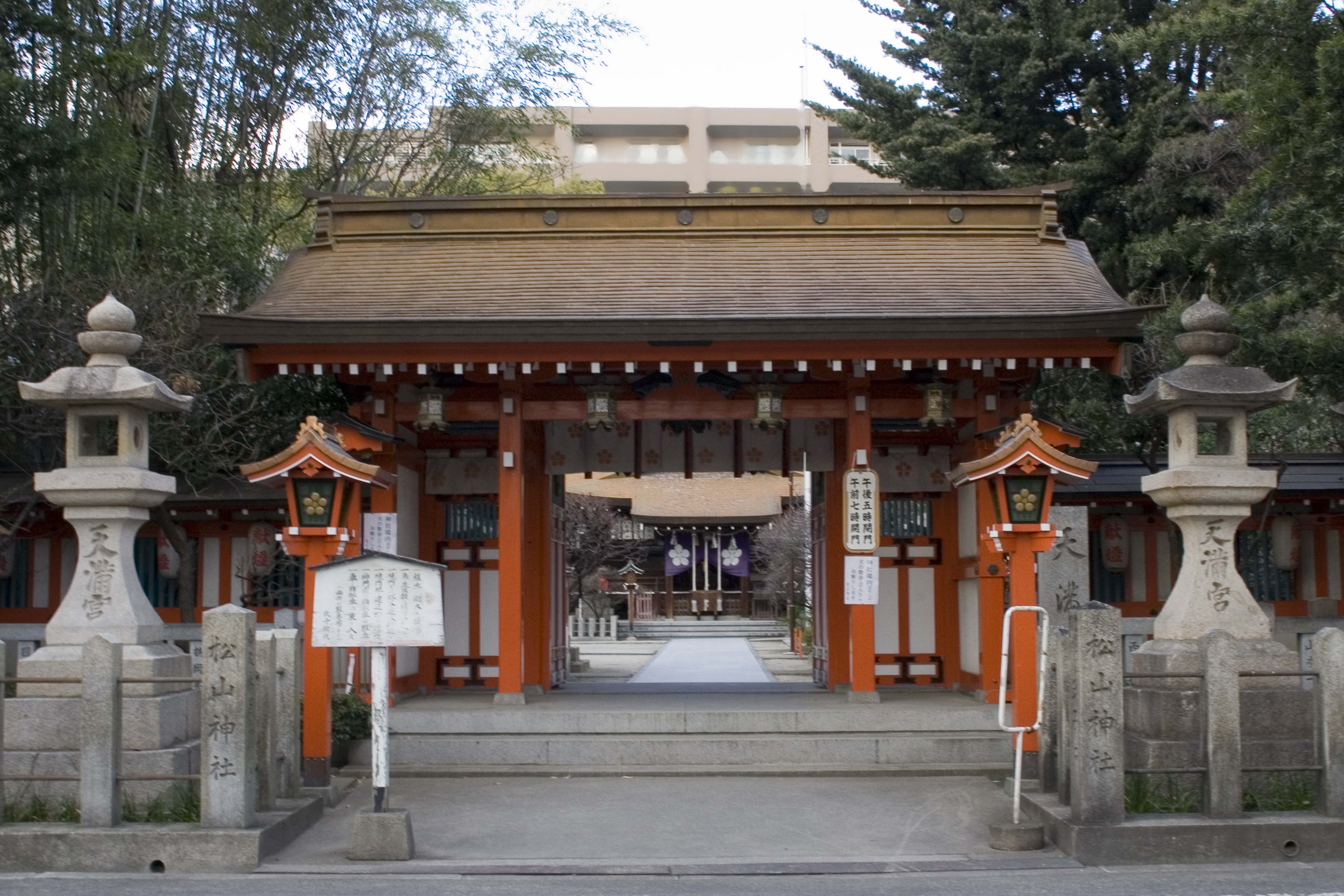 松山神社（大阪市東淀川区）